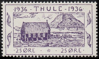 Почтовая марка Туле (Гренландия)